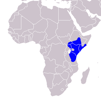 Tockus deckeni - Distribution